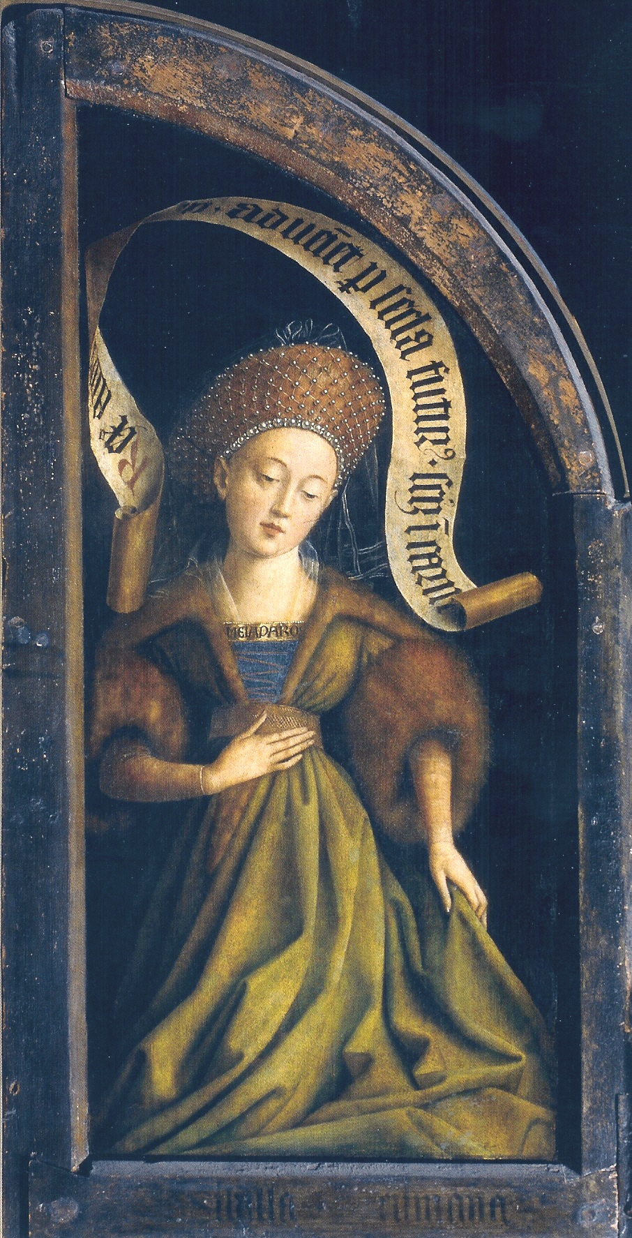 detail: Sybil